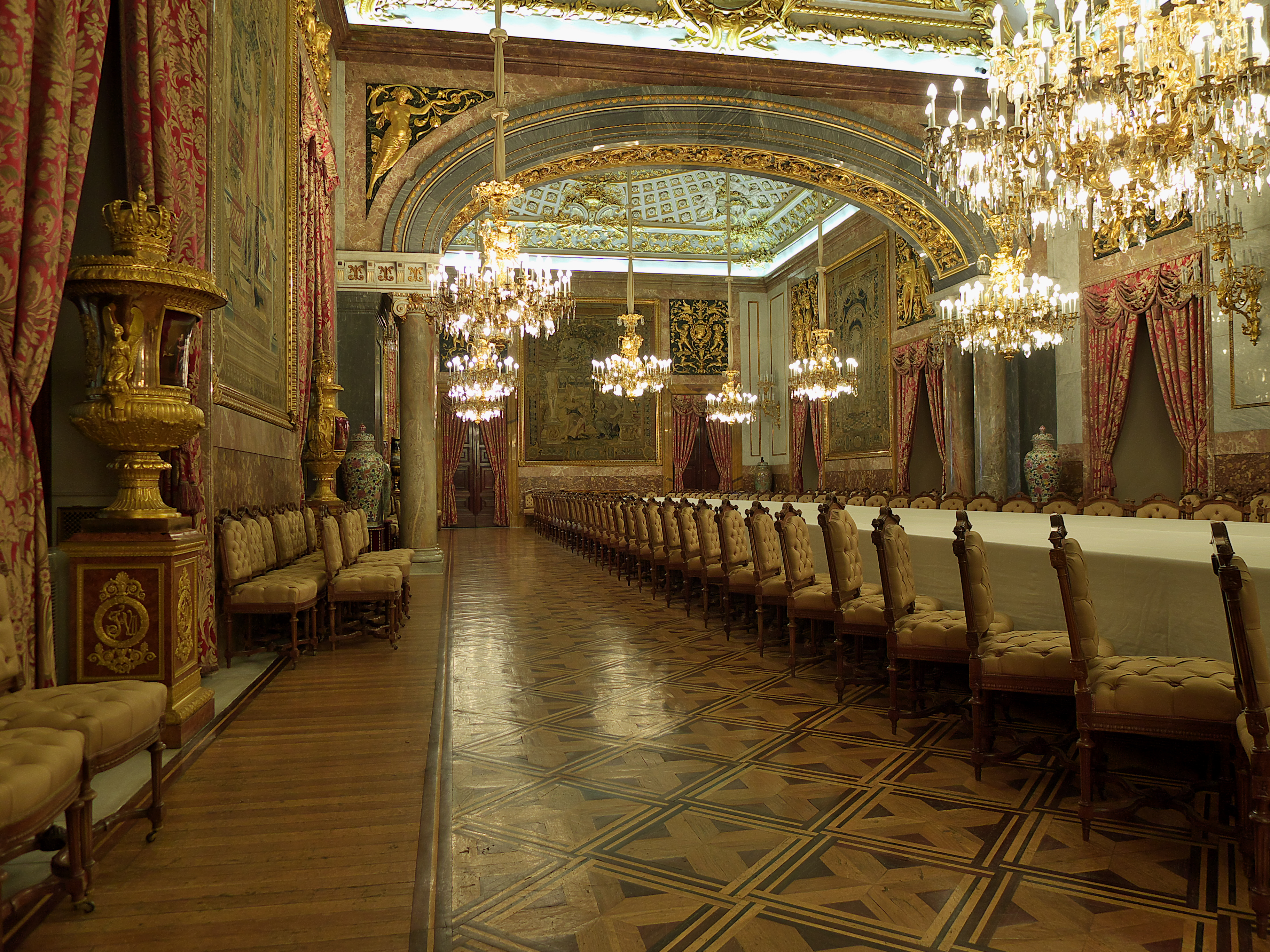 Alfonso XII replanteó el espacio suficiente para disponer de un comedor de gala para ciento veinte comensales.